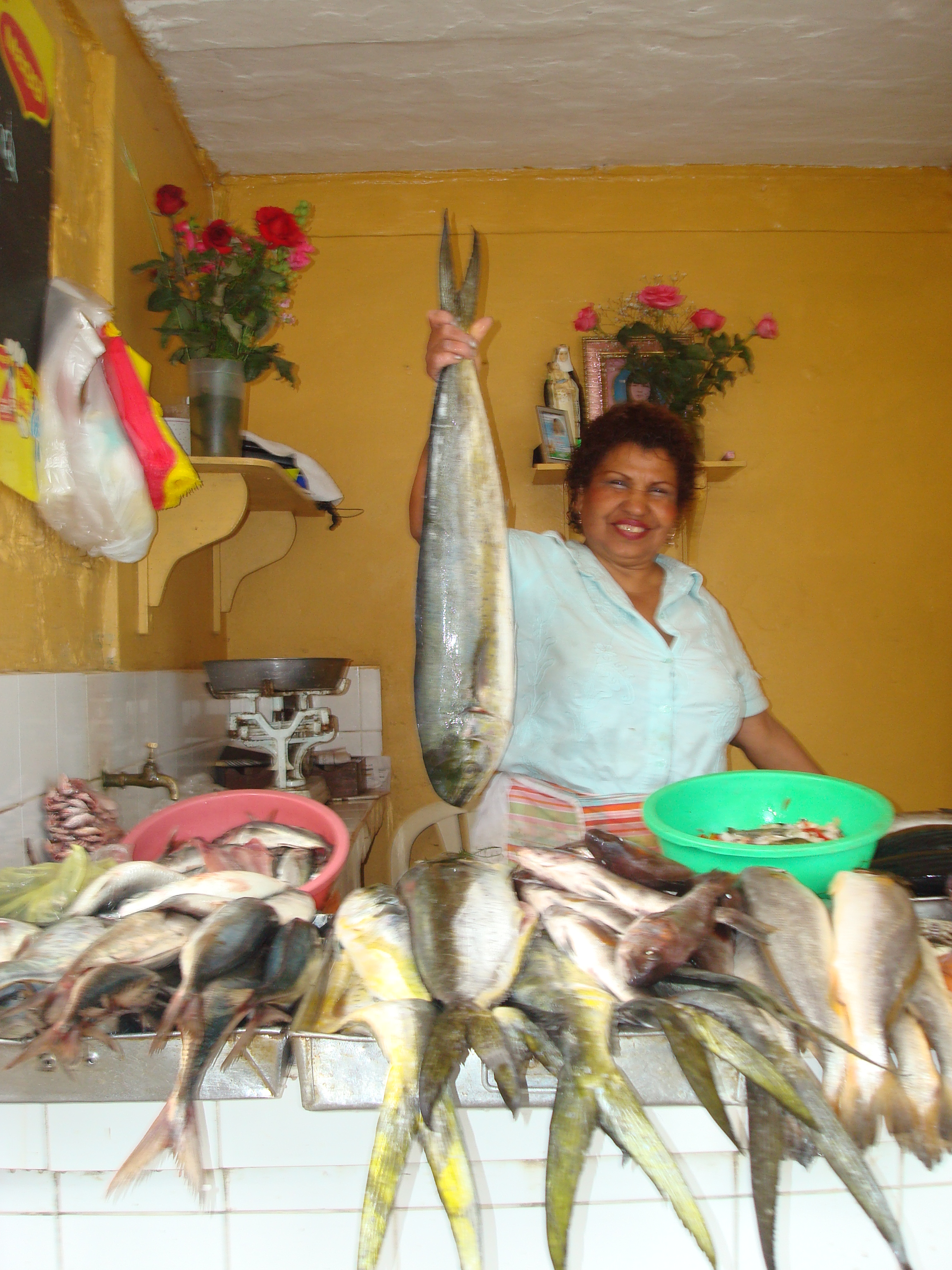 Vendedora de pescado en un mercado de Lima.